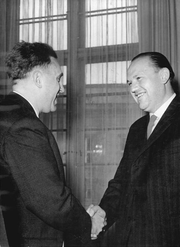 Zentralbild Hochneder 22.5.1963 Ge-Pr Johannes-R.-Becher-Preis 1963 für Franz Fühmann. Kulturminister Hans Bentzien (links) verlieh am 22.5.1963, dem 72. Geburtstag Bechers, den Johannes-R.-Becher-Preis 1963 an den Lyriker und Erzähler Franz Fühmann. An der Feierstunde im Berliner Club der Kulturschaffenden nahmen Lilly Becher, der Stellvertretende Vorsitzende des Ministerrats Alexander Abusch, Staatsratsmitglied Prof. Hans Rodenberg, Kulturbundpräsident Prof. Max Burghardt und weitere Persönlichkeiten teil.